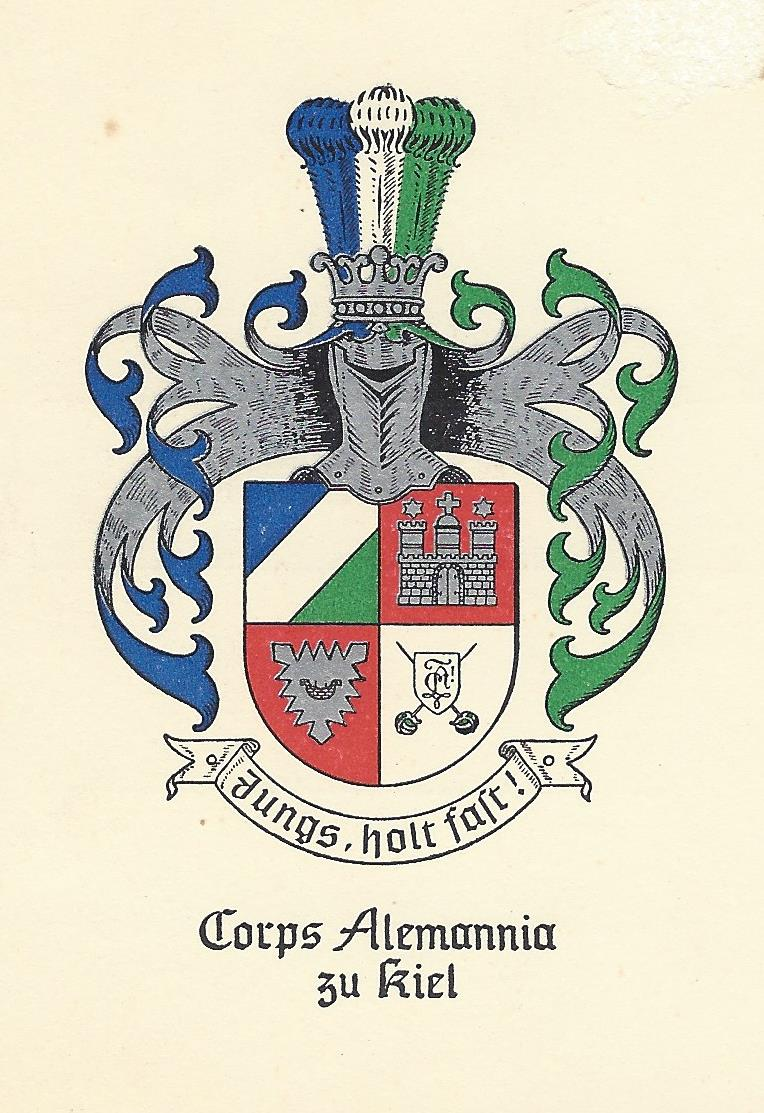 Studentenwappen des Corps Alemannia Kiel im Weinheimer Senioren-Convent